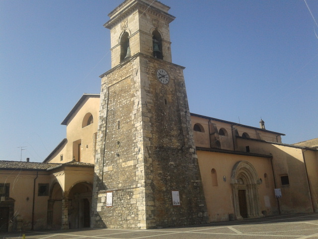 Basilica dei SS. Cesidio e Rufino